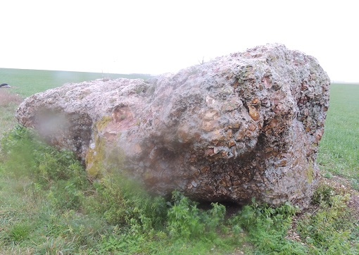 Dolmen de la Pierre Coquelée, dont on ne voit que la table hors de terre au bord d'un chemin avec un champs de jeunes betteraves en arrière plan